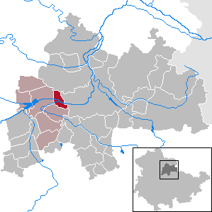 Wundersleben in Thuringia - District Sömmerda